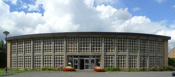 Roeselare Heirweg zonder nummer Sint-Catharinakerk